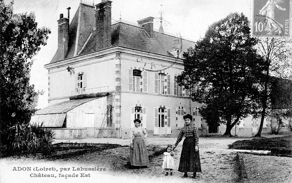 Le château, Adon, Loiret, France